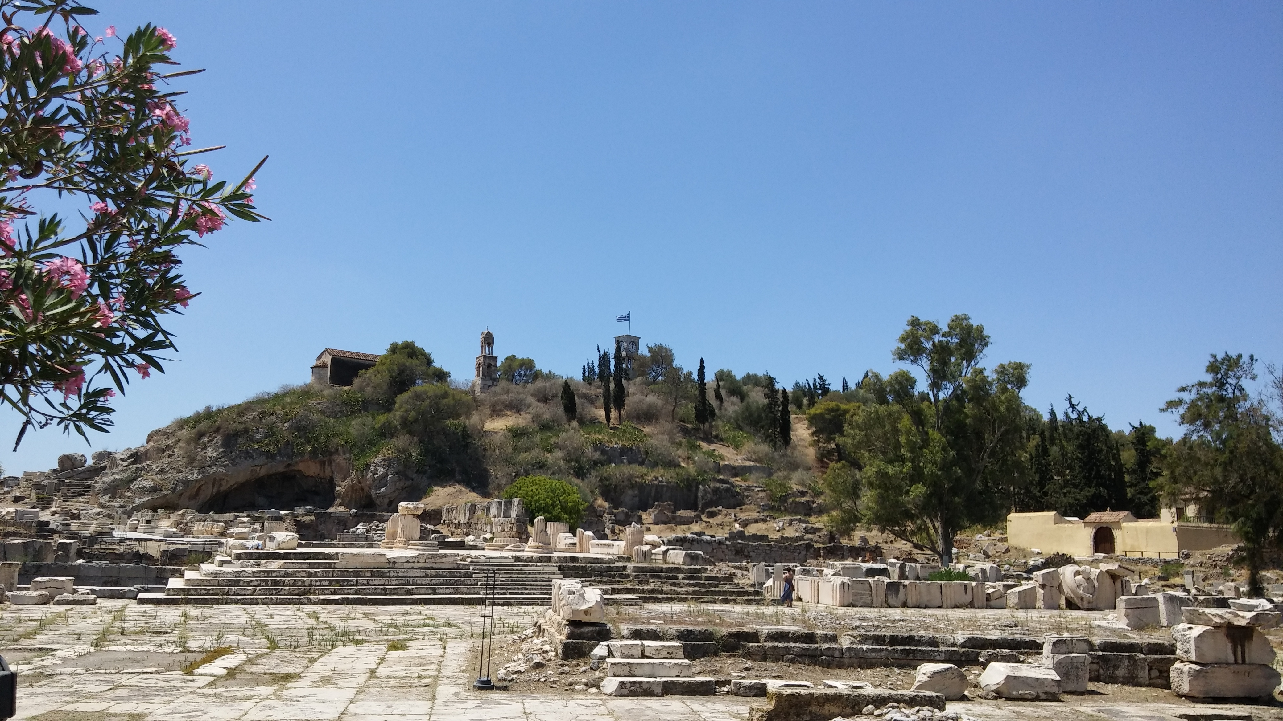 Αρχαιολογικός χώρος Ελευσίνας (άποψη)«Ελευσίνα»